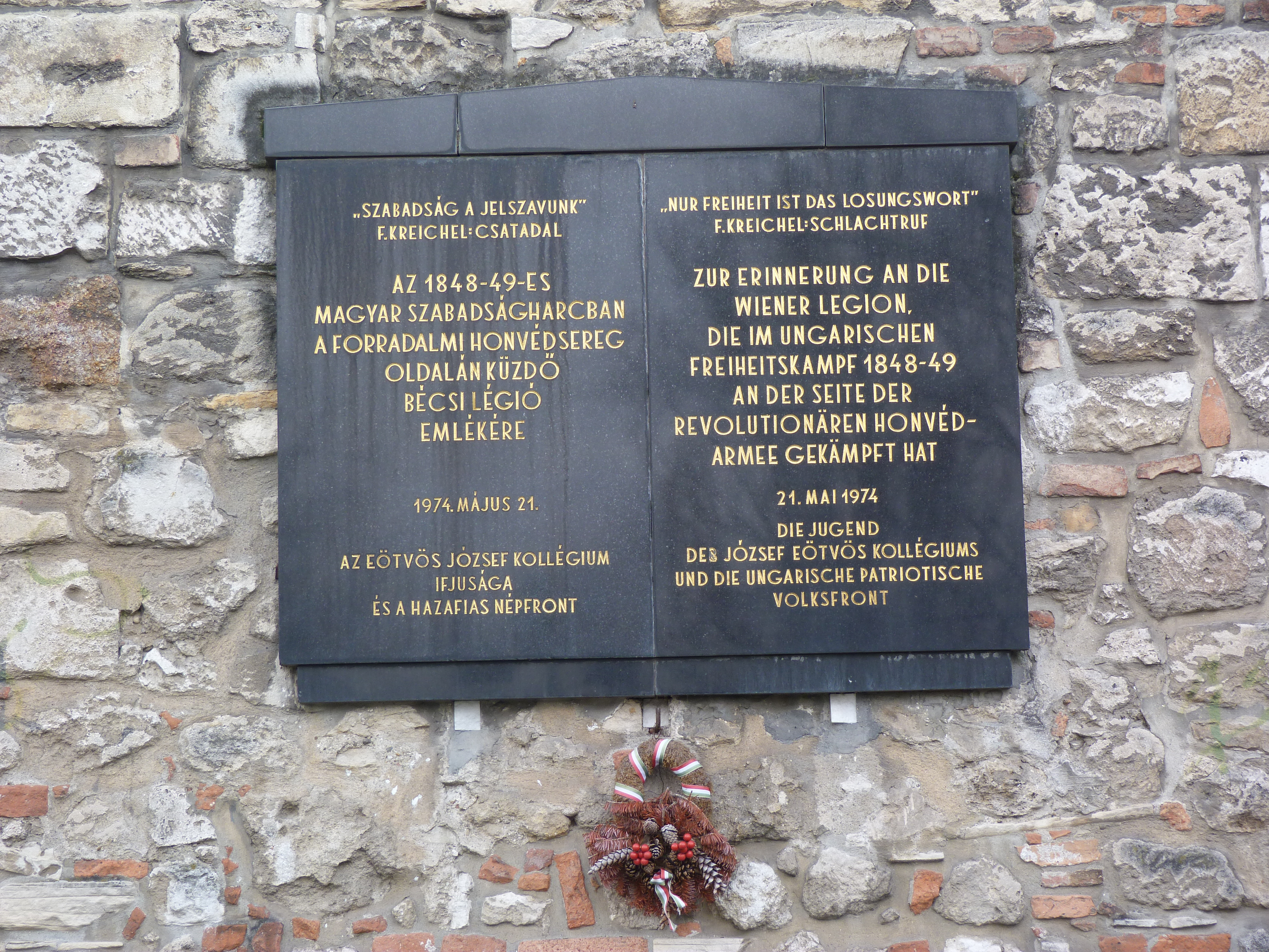 A felvétel 2013. január 25 -én, pénteken készült Budapesten. A Budai Vár, Váralja. A Bécsi légió - 1848-49 emléktáblája. ©© Megjelent Creative Commons alatt a Metapolisz sorozatban. A Metapolisz sorozat valamennyi képe és filmje Creative Commons alatti valamint kereskedelmi - for profit - célra is felhasználható. Ajánlott hivatkozás: Derzsi Elekes Andor: Metapolisz DVD line